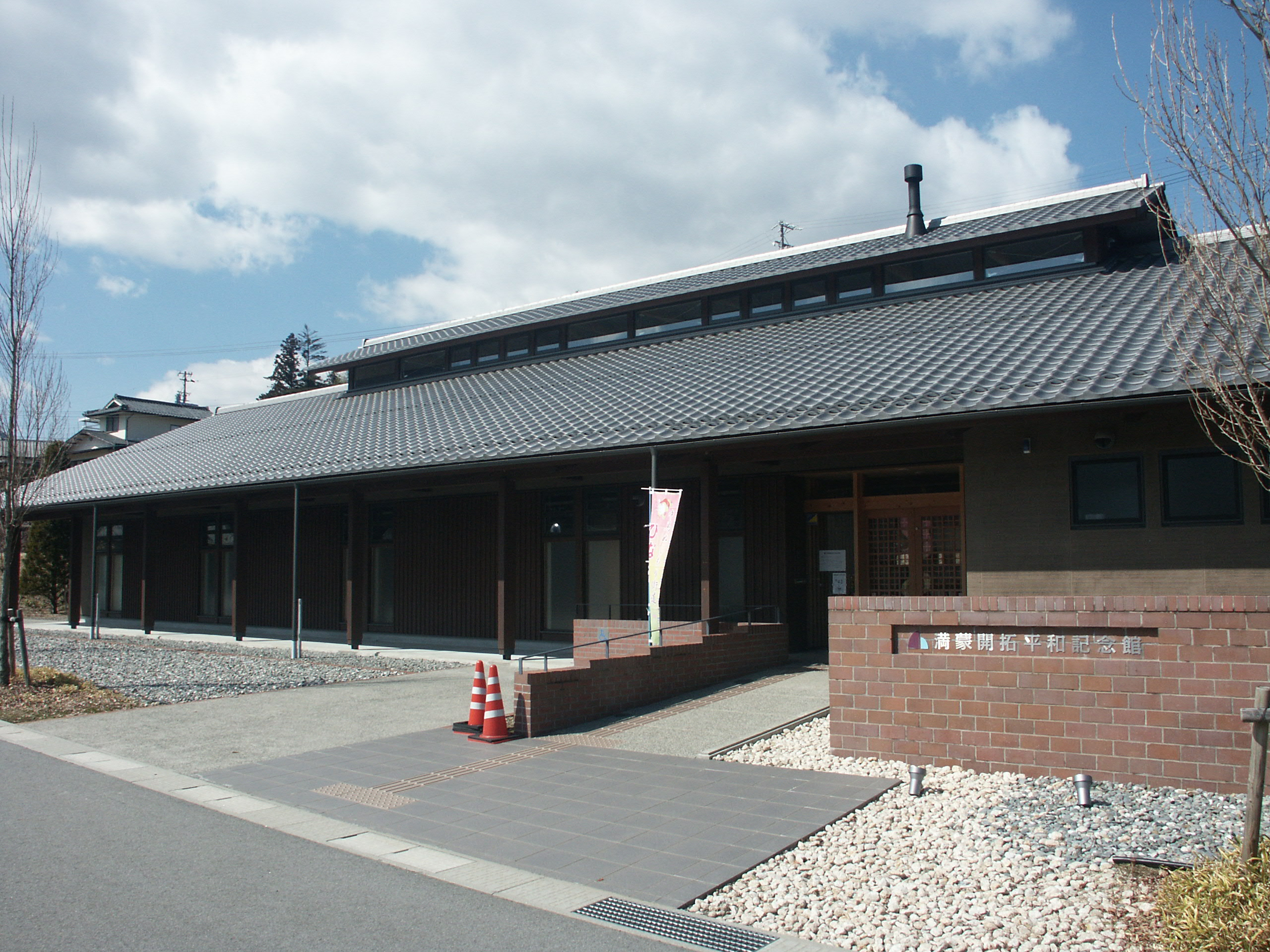 長野県阿智村に所在する満蒙開拓平和記念館